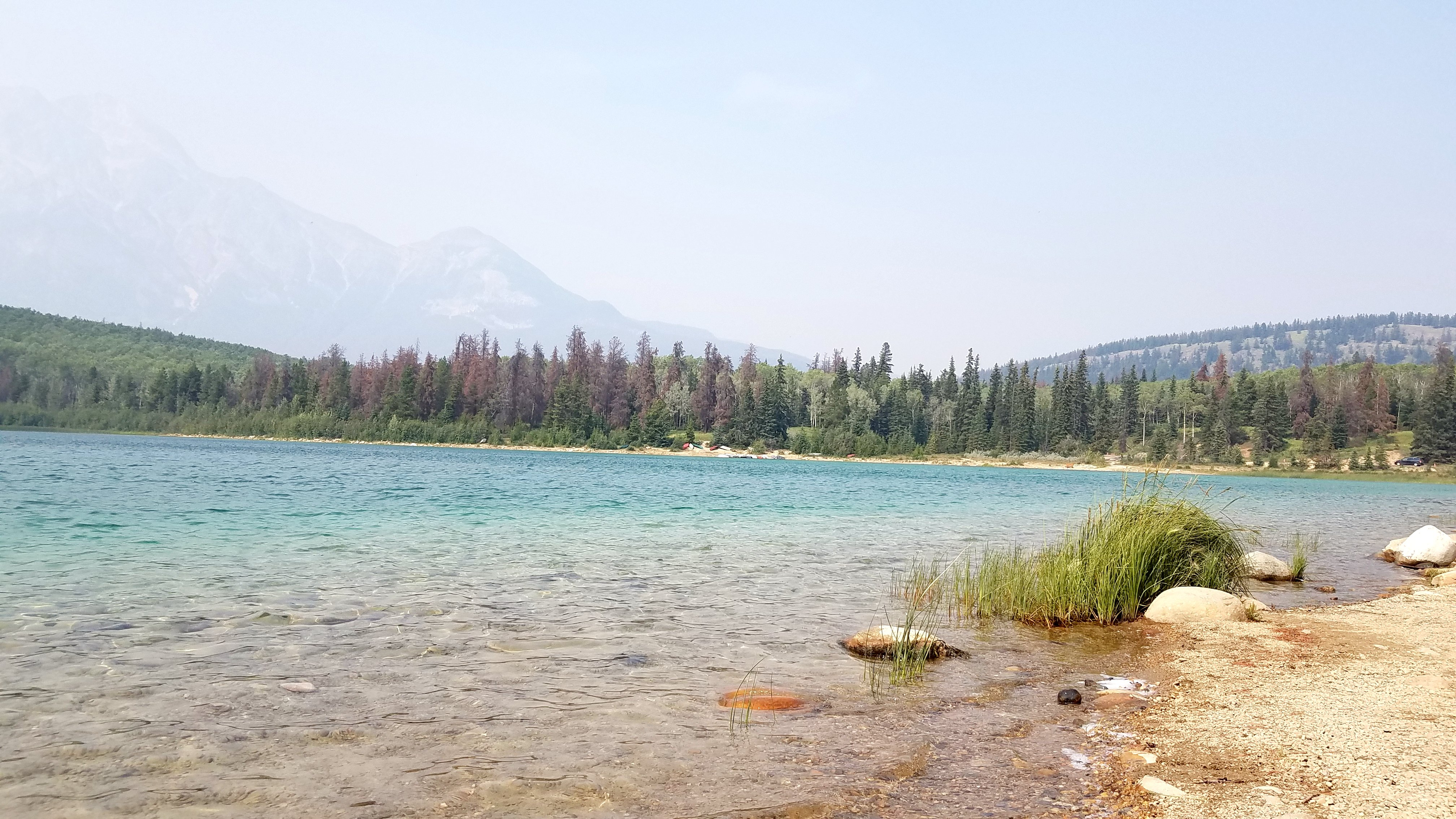 Patricia Lake